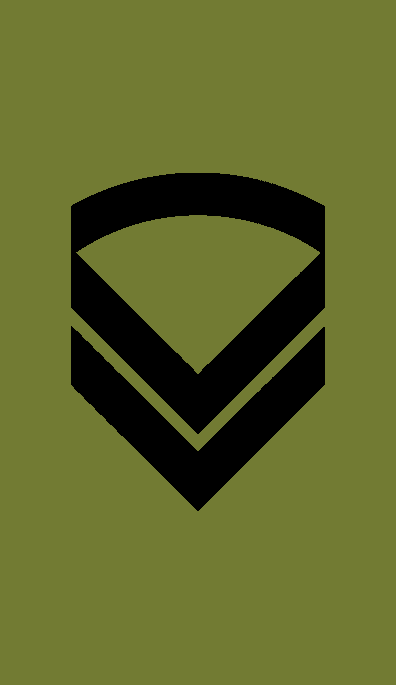 Distinksjoner Seniorkorporal